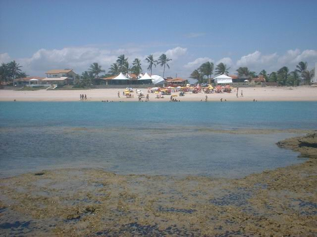 Foto nos Arrecifes na Barra de São Miguel-AL, Brasil. Juliano Salvá